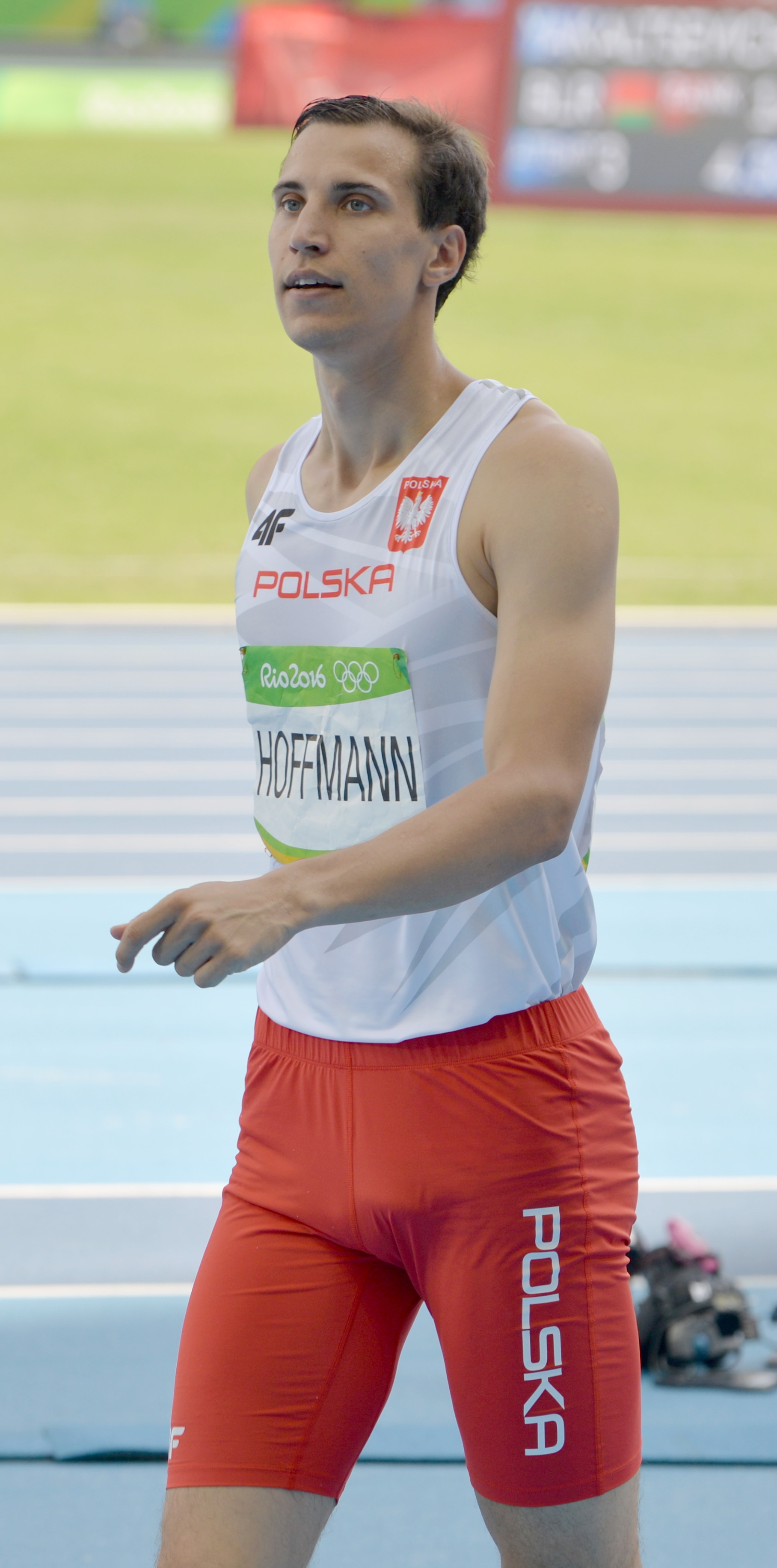 Karol Hoffmann au concours du triple saut aux jeux olympique de Rio 2016